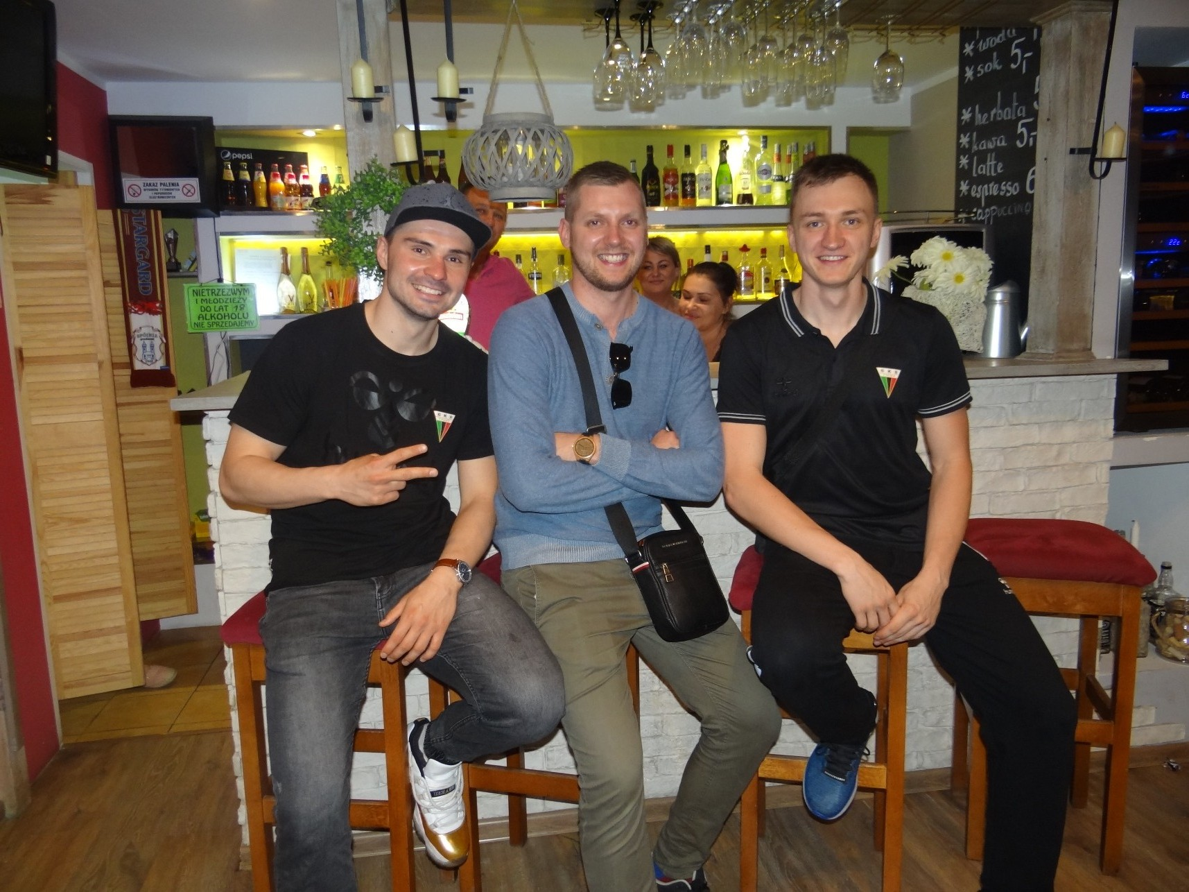 Zawodnicy GKS Tychy po meczu (29.04.2018)